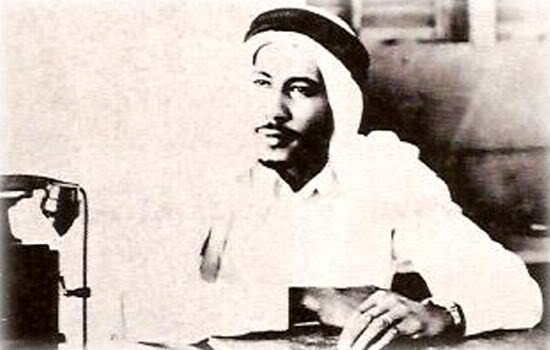 Hasn Sror Sabban